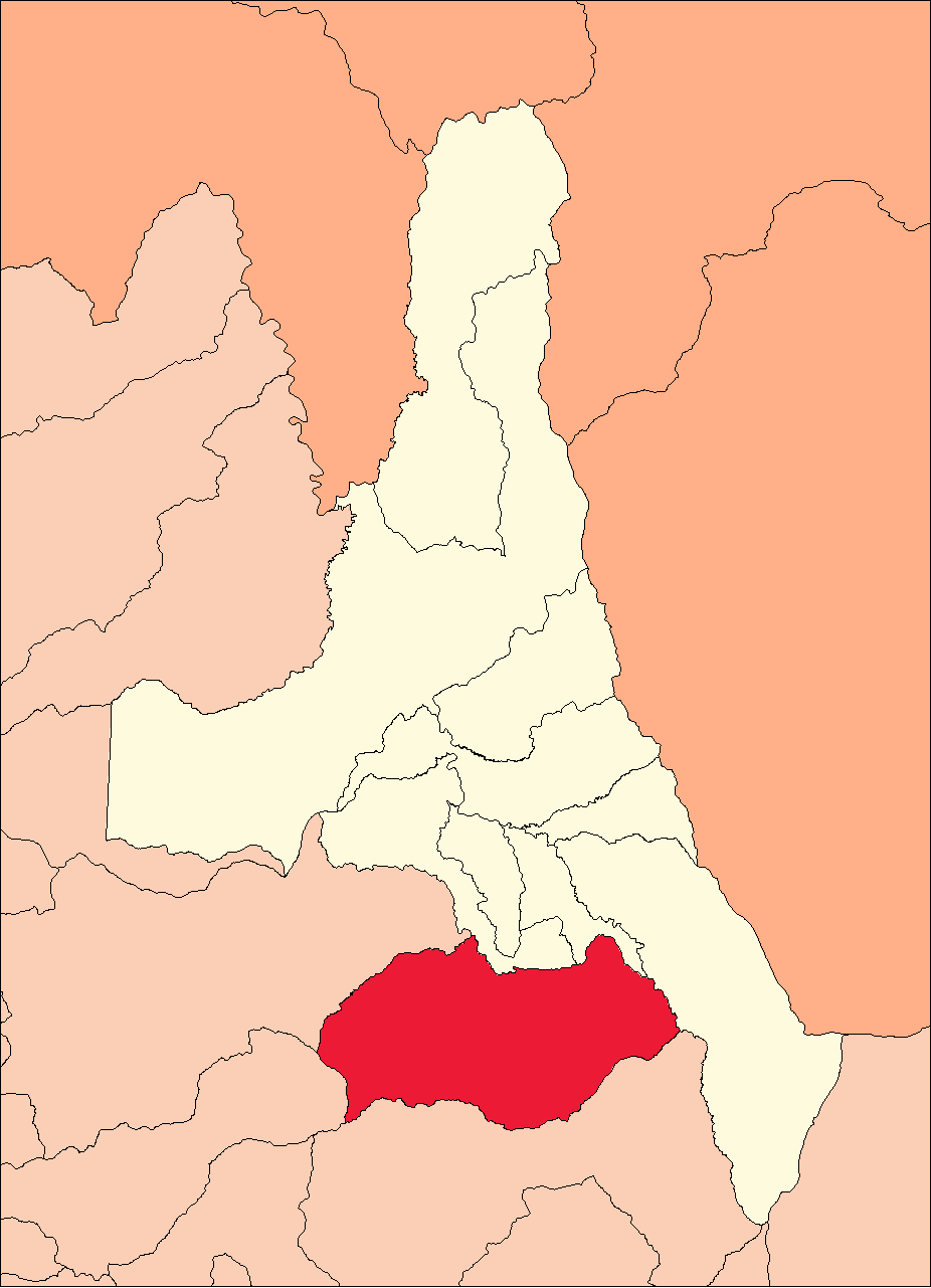 Área del distrito de Mariano Dámaso Beraún.